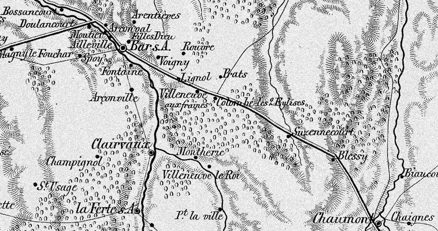 Karte der Region zwischen Chaumont und Bar-sur-Aube in Frankreich